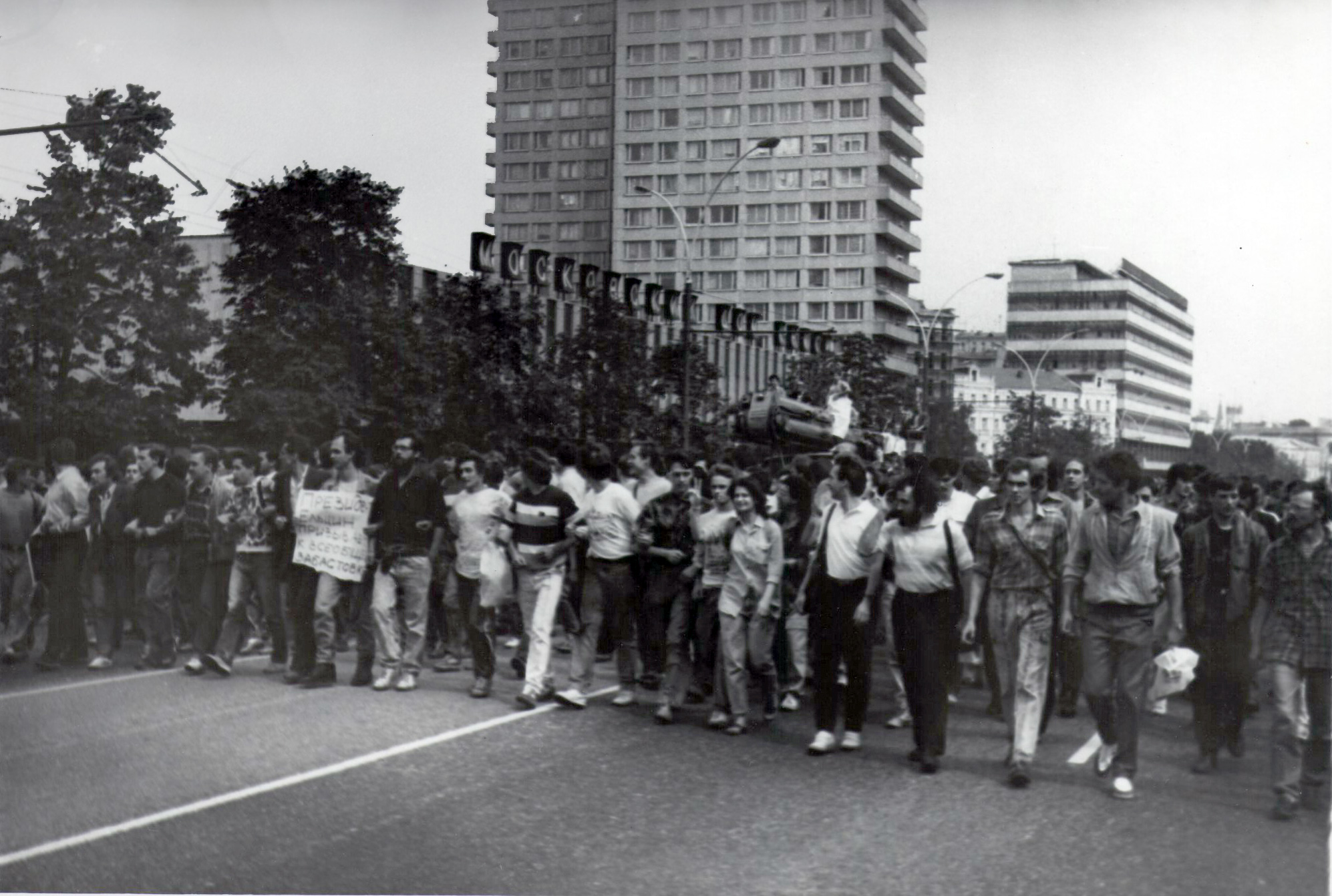 Moszkva, Kalinyin sugárút, 1991. augusztus 19. A tömeg a Kremltől a Fehér Házhoz vonul.